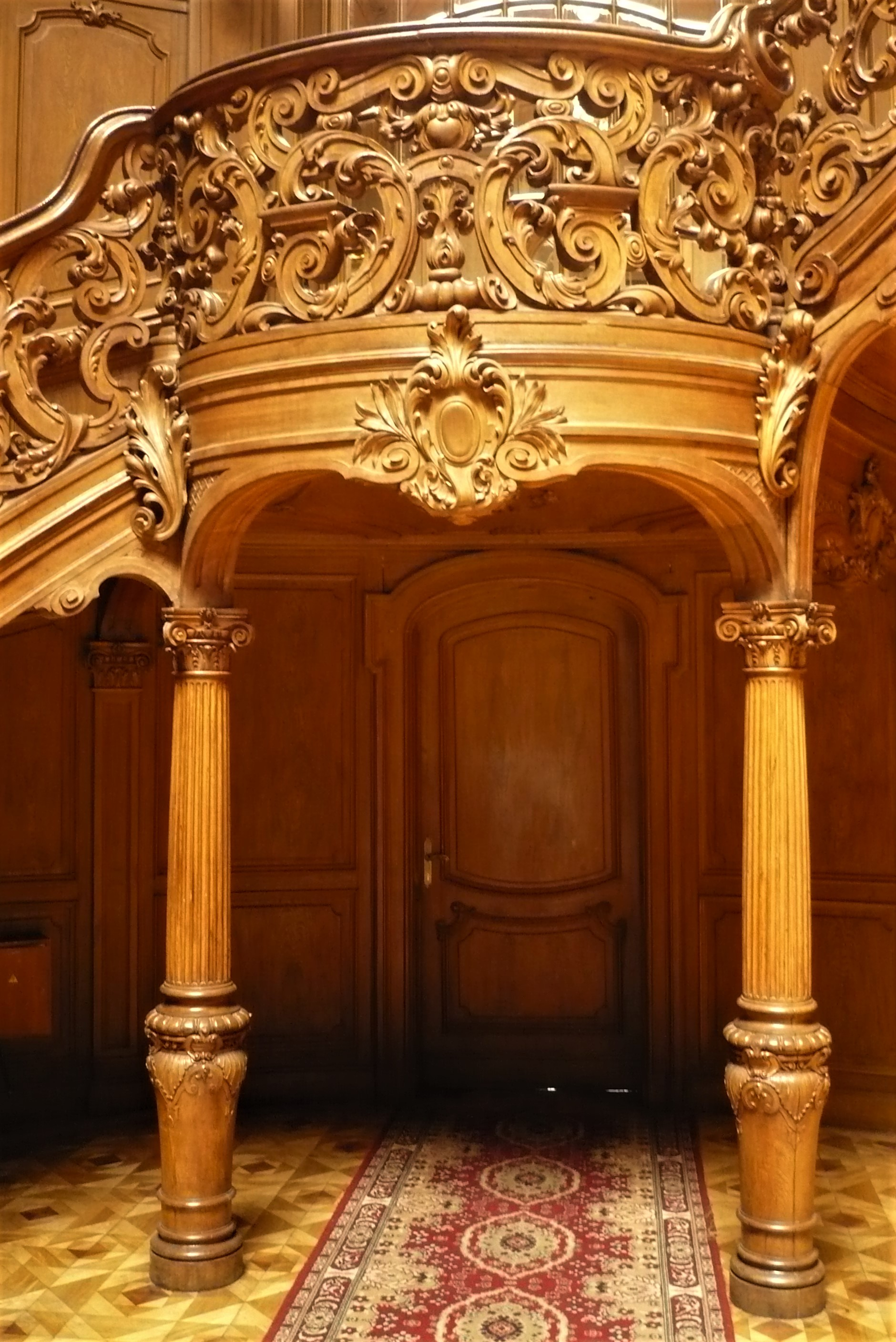 Kasyno Szlacheckie we Lwowie